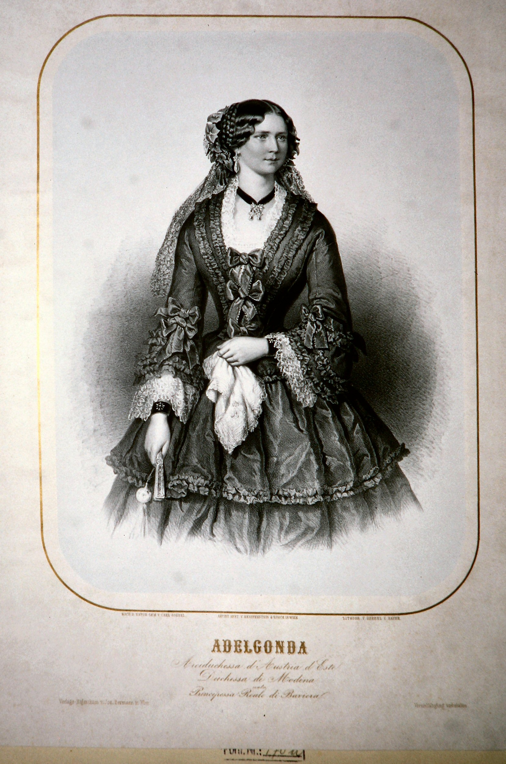 Adelgonda, Archiduchessa d' Austria d' Este, Duchessa di Modena, Lithographie von Carl Goebel